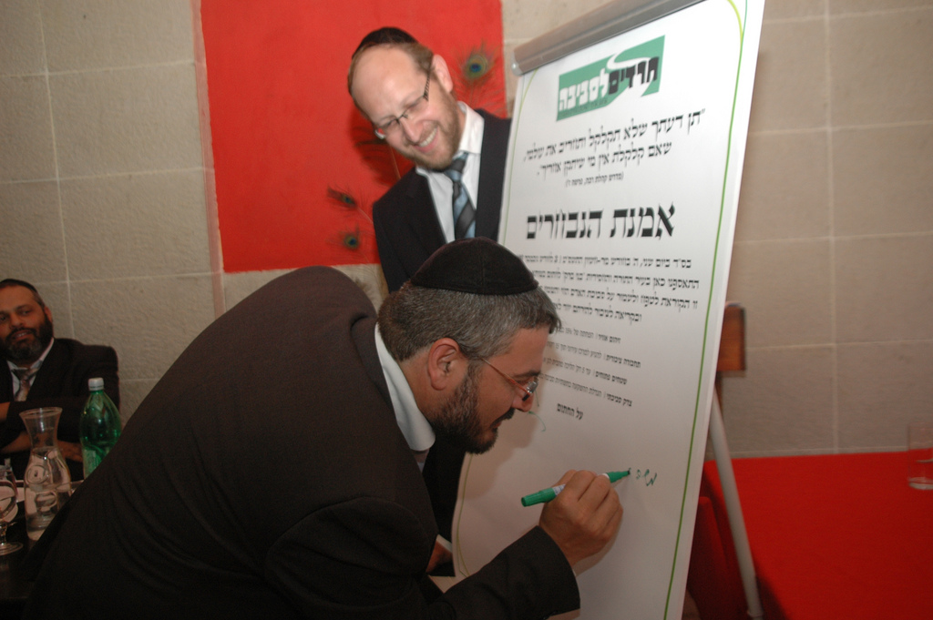 ראש העיר בית שמש חותם על אמנה לסביבה